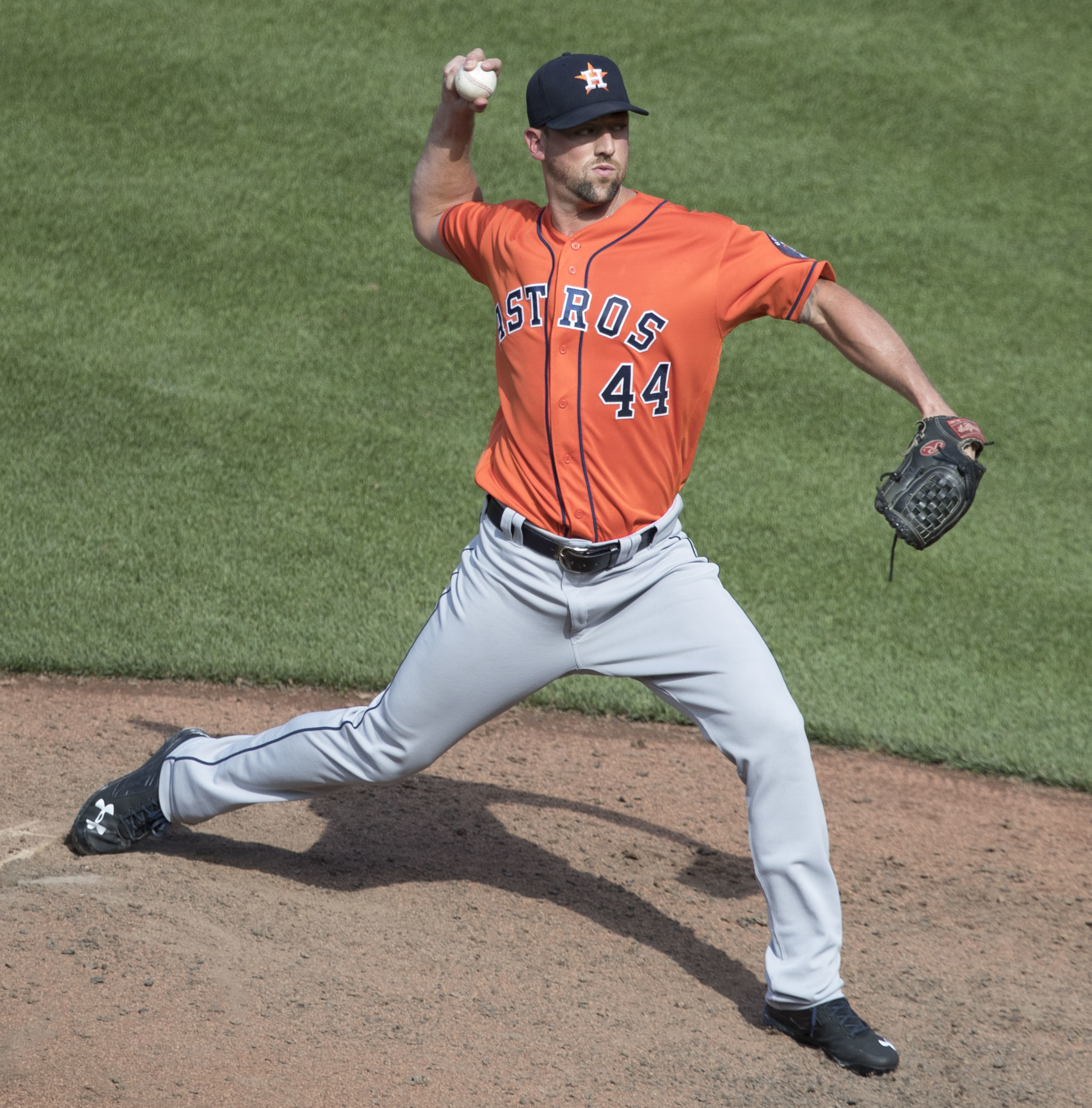 Astros at Orioles 7/23/17